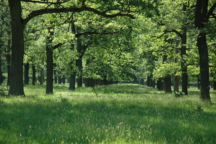 Hutewald im Reinhardswald (Alter 167 Jahre)